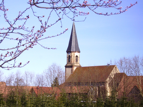 Eglise de STOTZHEIM